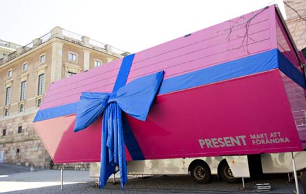 Utvecklingsrummet utklädd till present i utställningen Present – Makt att förändra.